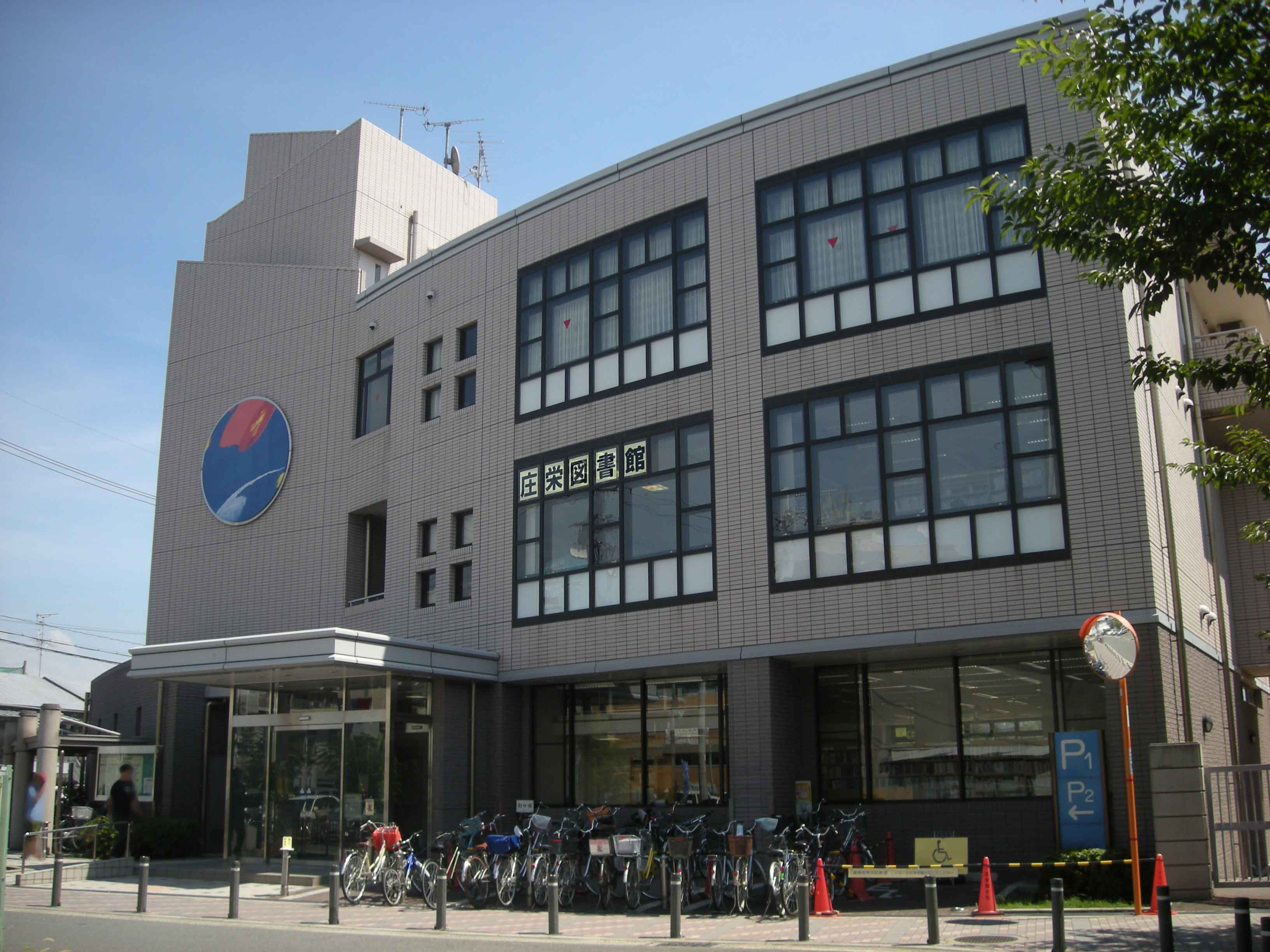 茨木市立庄栄図書館